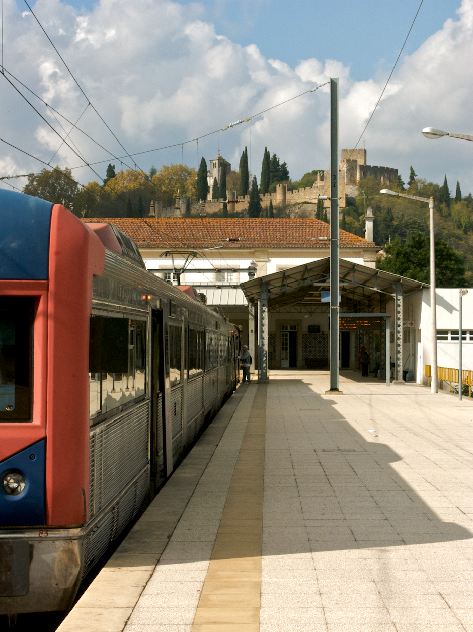 Tipo: Comboio Regional 4422 [Tomar - Lisboa • Santa Apolónia] Local: Estação de Tomar [Ramal de Tomar, PK 14] Data e hora: 1 de Novembro de 2008 [13h12] Material: Automotora 2283 [Unidade Tripla Eléctrica]